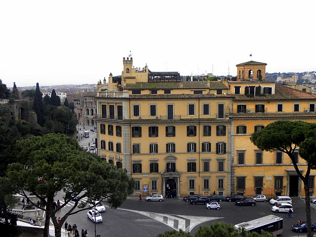 Roma